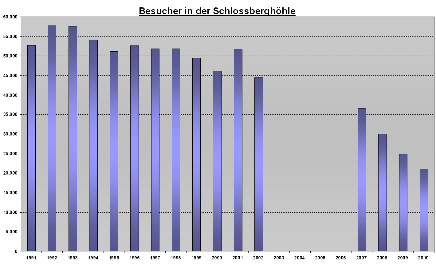 Besucherzahlen in den Schlossberghöhlen. Von 2003 bis 2006 geschlossen.